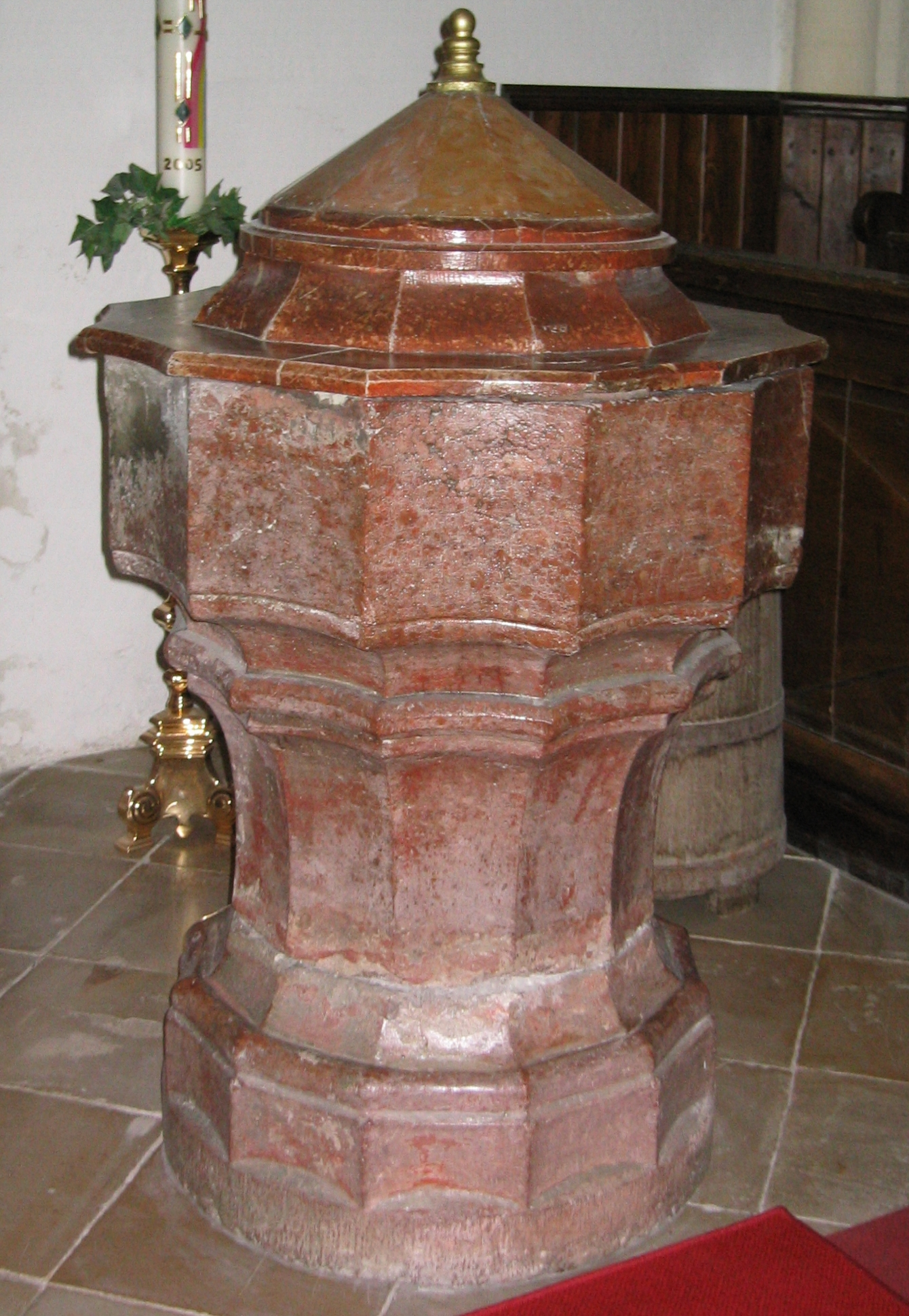 Taufbecken um 1500 in der katholischen Pfarrkirche heiliger Martin in Sitzendorf an der Schmida